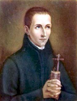 Неизвестный автор. Портрет Яна Берхманса (XIX век).